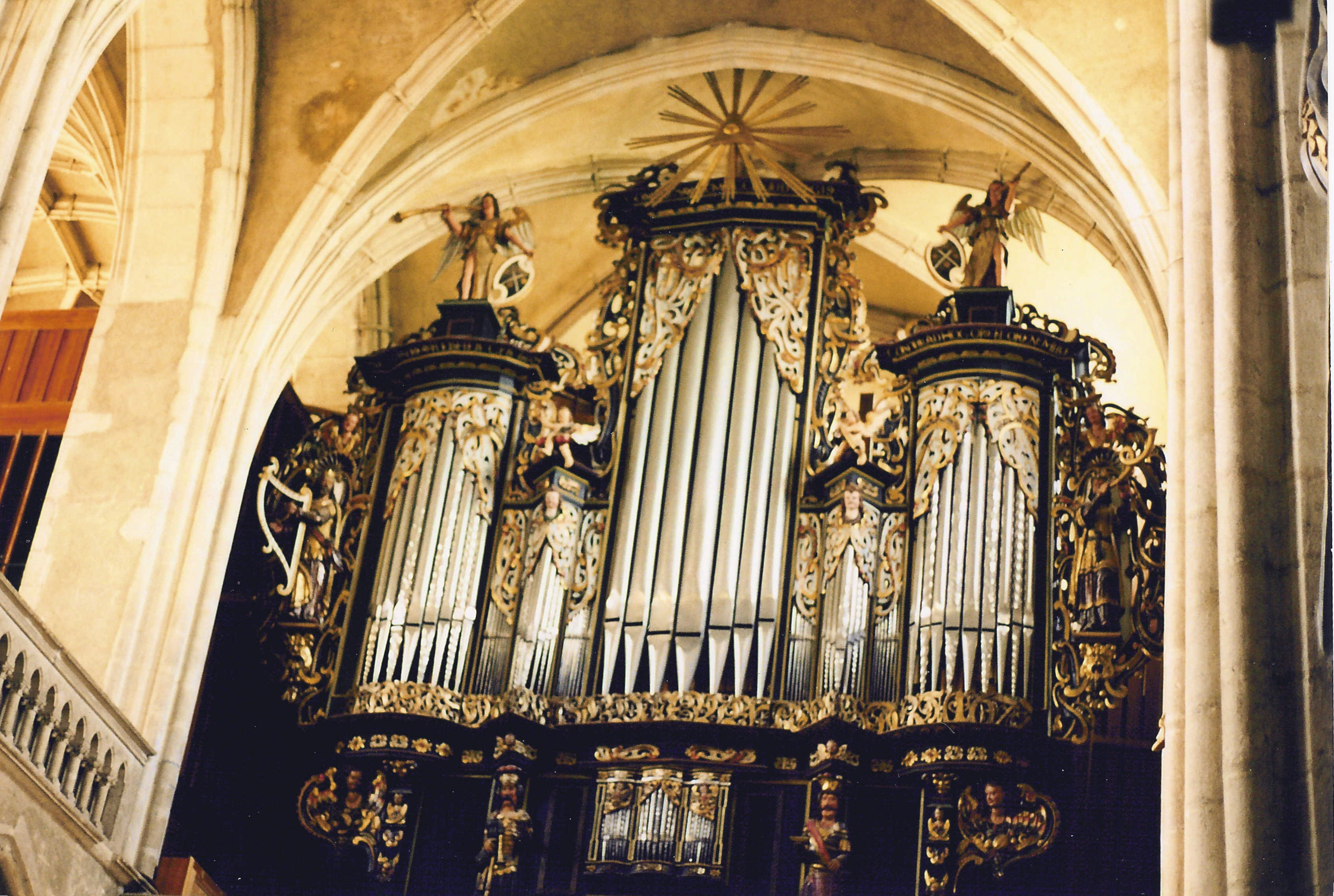 Organ, Evangelical Church, Sibiu, Romania.